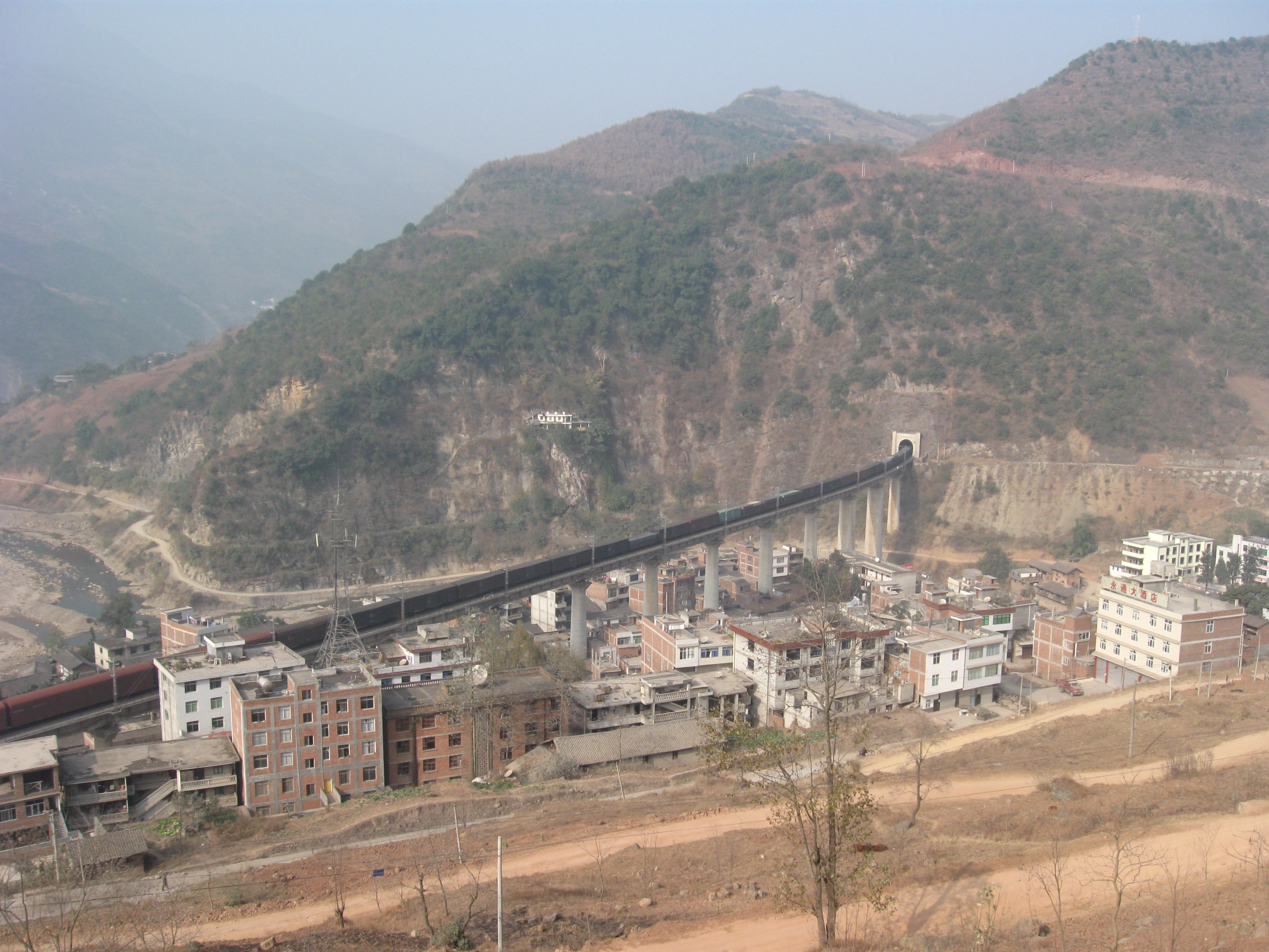 天星火车站